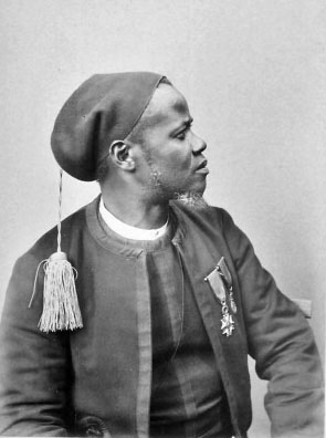 Yora Comba, 38 ans, St Louis, lieutenant aux tirailleurs sénégalais (l'un des 41 portraits anthropologiques présentés à l'Exposition universelle de 1889 à Paris)